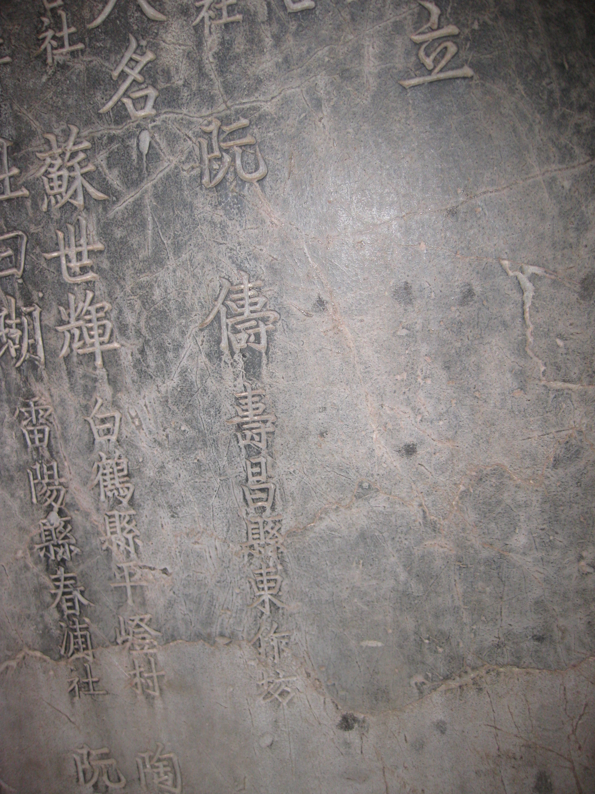 Bia tiến sĩ Nguyen Tru